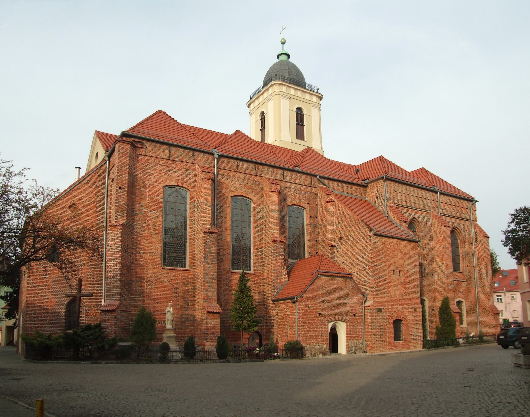 Concathedral in Zielona Góra. Konkatedra św. Jadwigi w Zielonej Górze, ściana południowa. Author: Mohylek 09:28, 30 October 2006 (UTC)